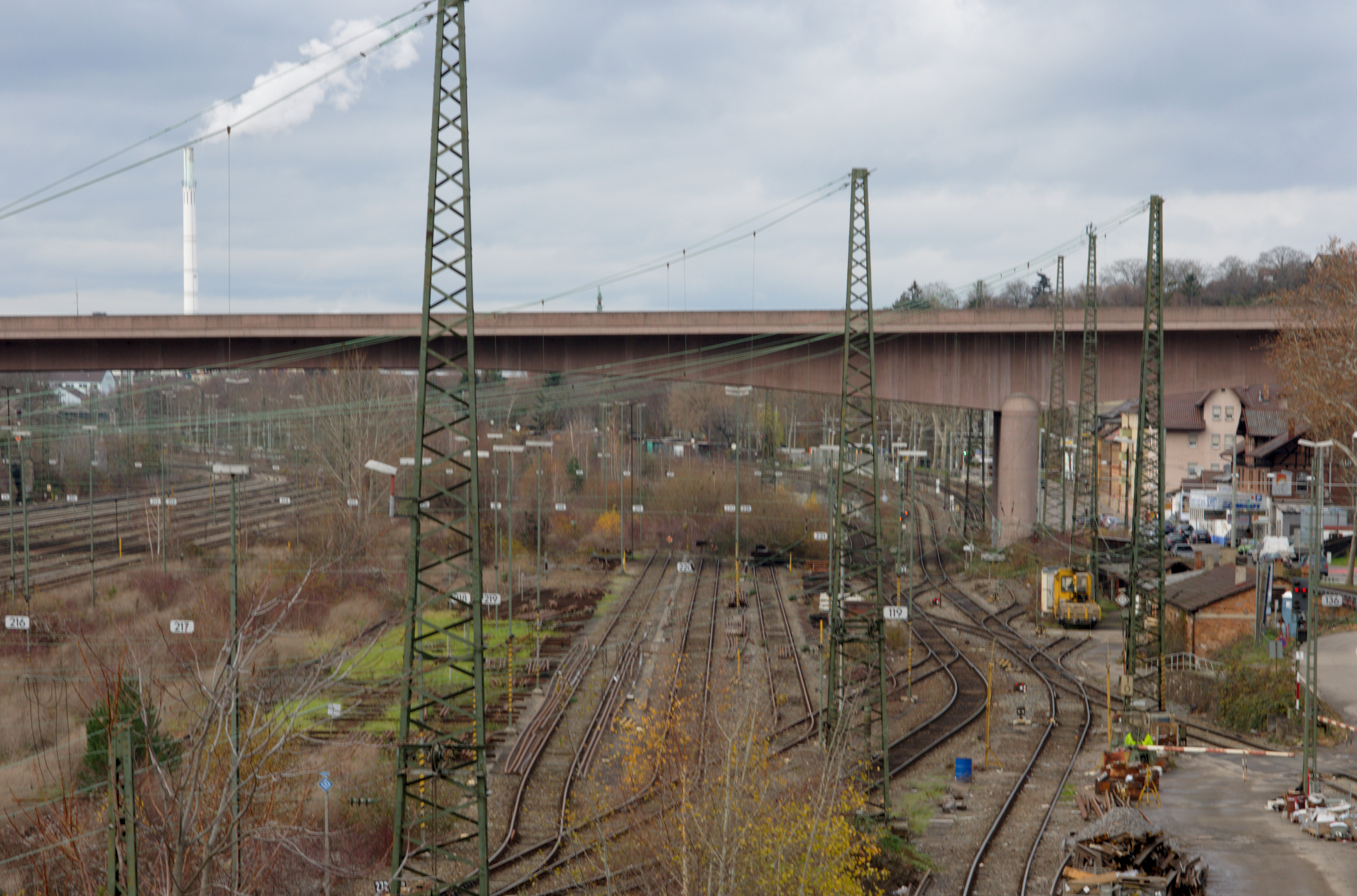 Stuttgart 21; das Gelände des geplanten Abstellbahnhofs Untertürkheim